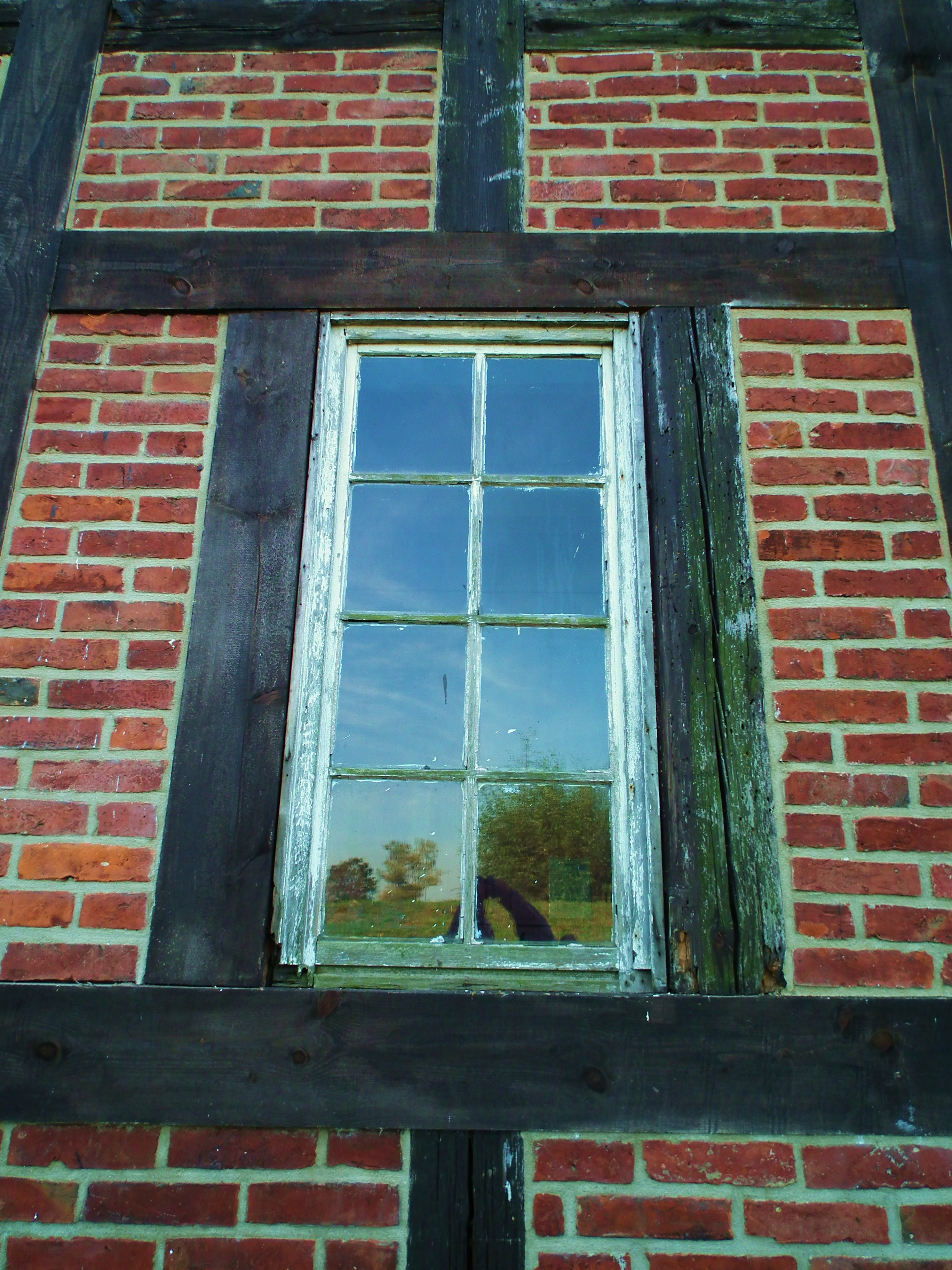 Oksza - dawny kościół ewangelicki, obecnie rzymskokatolicki filialny pw. MB Częstochowskiej, 1862-1863